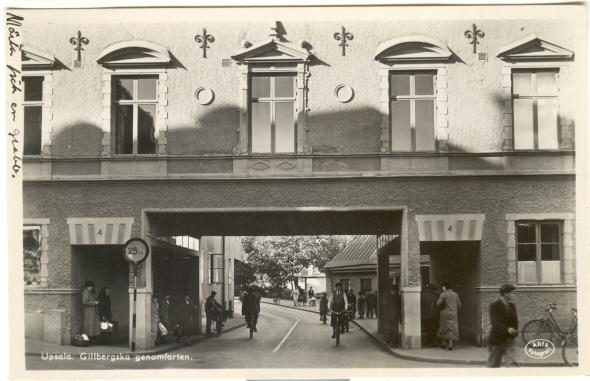 buildings, uppsala, sweden